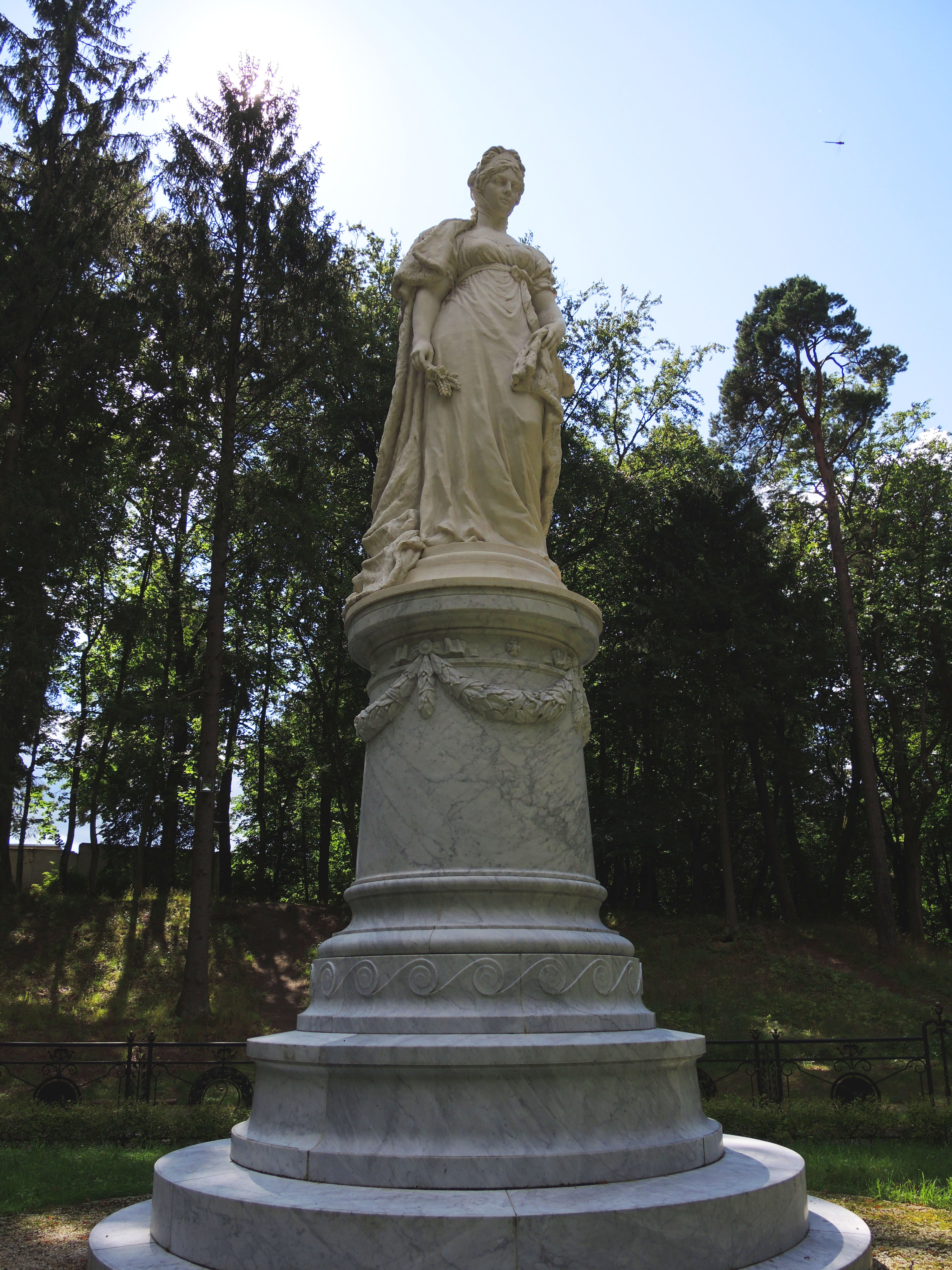 Парк Якобсру: Советск, Калининградская область